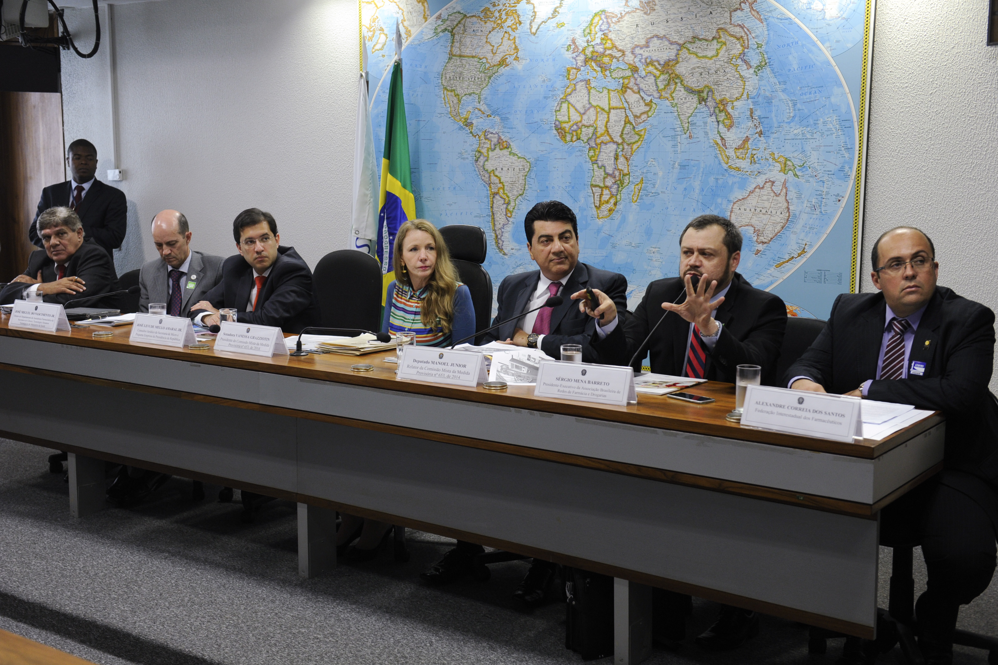 Sala de comissões do Senado durante audiência pública da Comissão Mista da Medida Provisória (CMMPV) para debater a MP 653/2014 que altera a Lei nº 13.021, de 8 de agosto de 2014, que dispõe sobre o exercício e a fiscalização das atividades farmacêuticas. Representantes da Associação Brasileira de Farmácias, do Conselho Federal de Farmácia e da Federação Interestadual dos Farmacêuticos participam de audiência pública sobre o tema. (E/D): presidente do Conselho Federal de Farmácia (CFF), Walter da Silva Jorge João; diretor do Departamento de Assistência Farmacêutica e insumos estratégicos do Ministério da Saúde (DAF/MS), José Miguel do Nascimento Jr; consultor jurídico na Secretaria de Micro e Pequenas Empresas da Presidência da República, José Levi de Mello do Amaral; presidente da MP 653/2014, senadora Vanessa Grazizotin (PCdoB-AM); relator, deputados Manoel Junior (PMDB-PB); presidente da Associação Brasileira de Redes de Farmácias e Drogarias (Abrafarma), Sérgio Mena Barreto; representante da Federação Interestadual dos Farmacêuticos (Feifar), Alexandre Correia dos Santos. Foto: Marcos Oliveira/Agência Senado